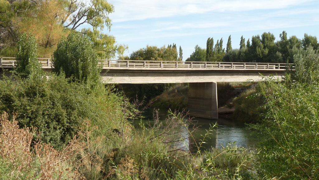 Puente San Cristobal sobre el río Chubut